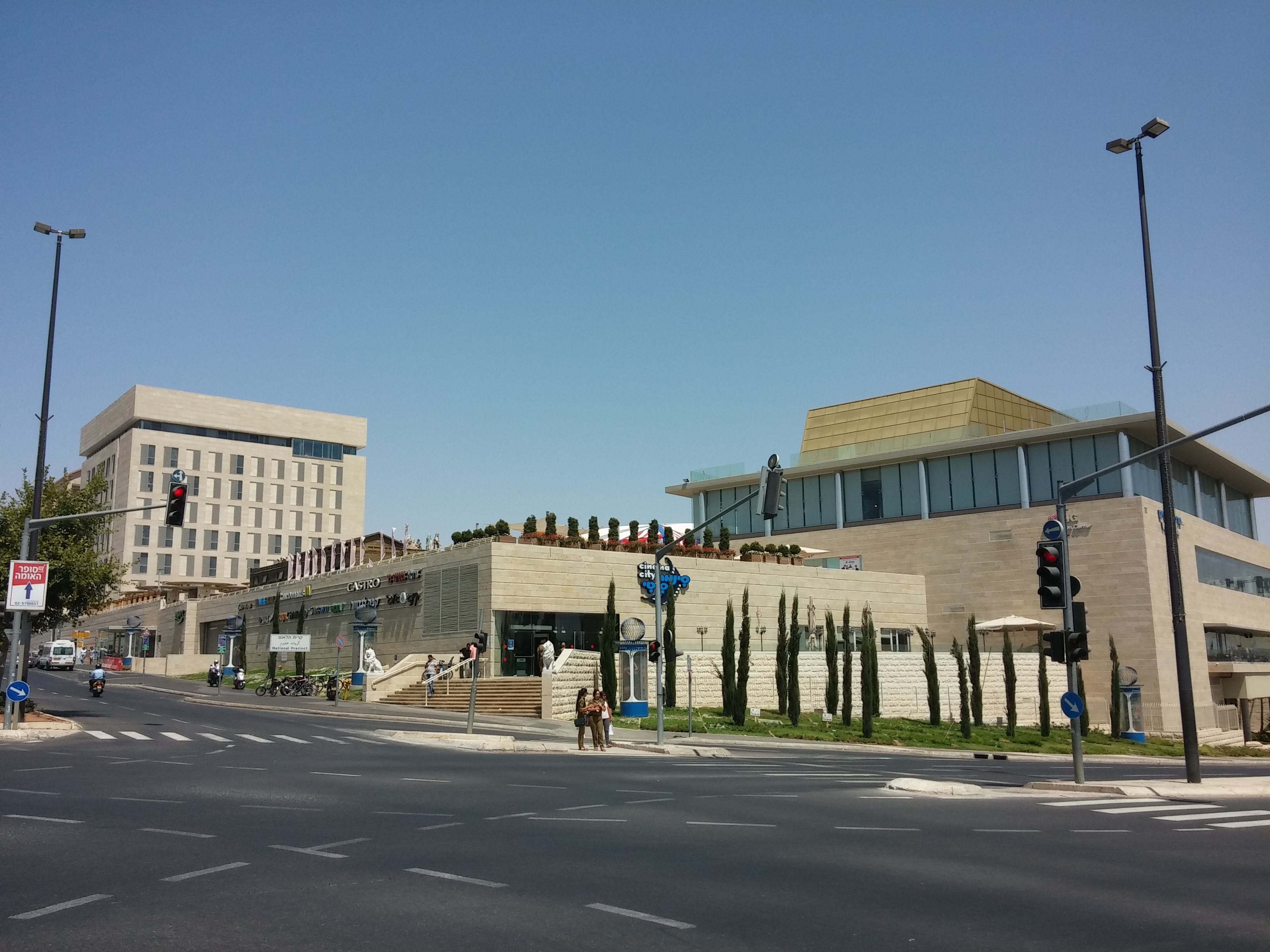 סינמה סיטי ירושלים, 2015